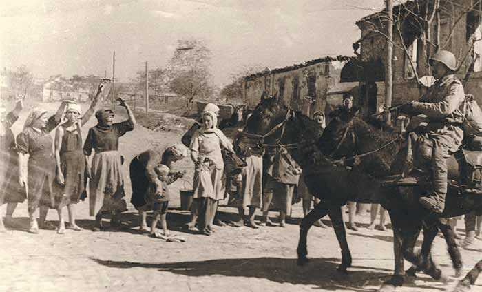 Звільнення Темрюка від німецької окупації, вересень 1943 року